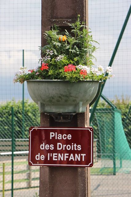 Ercheu, Somme, France, place des droits de l'enfant, inaugurée le 14 juillet 2019.